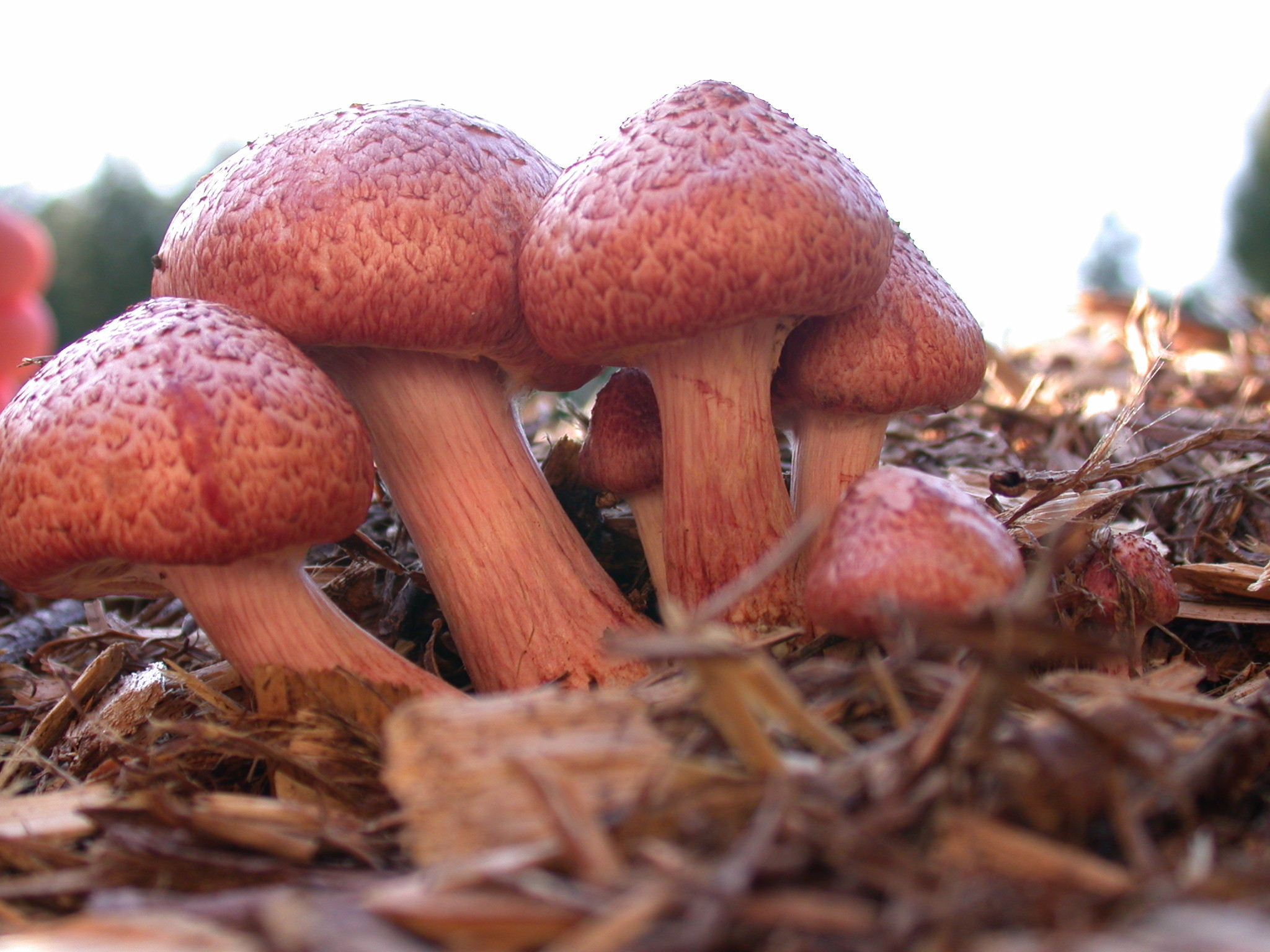 Gymnopilus luteofolius